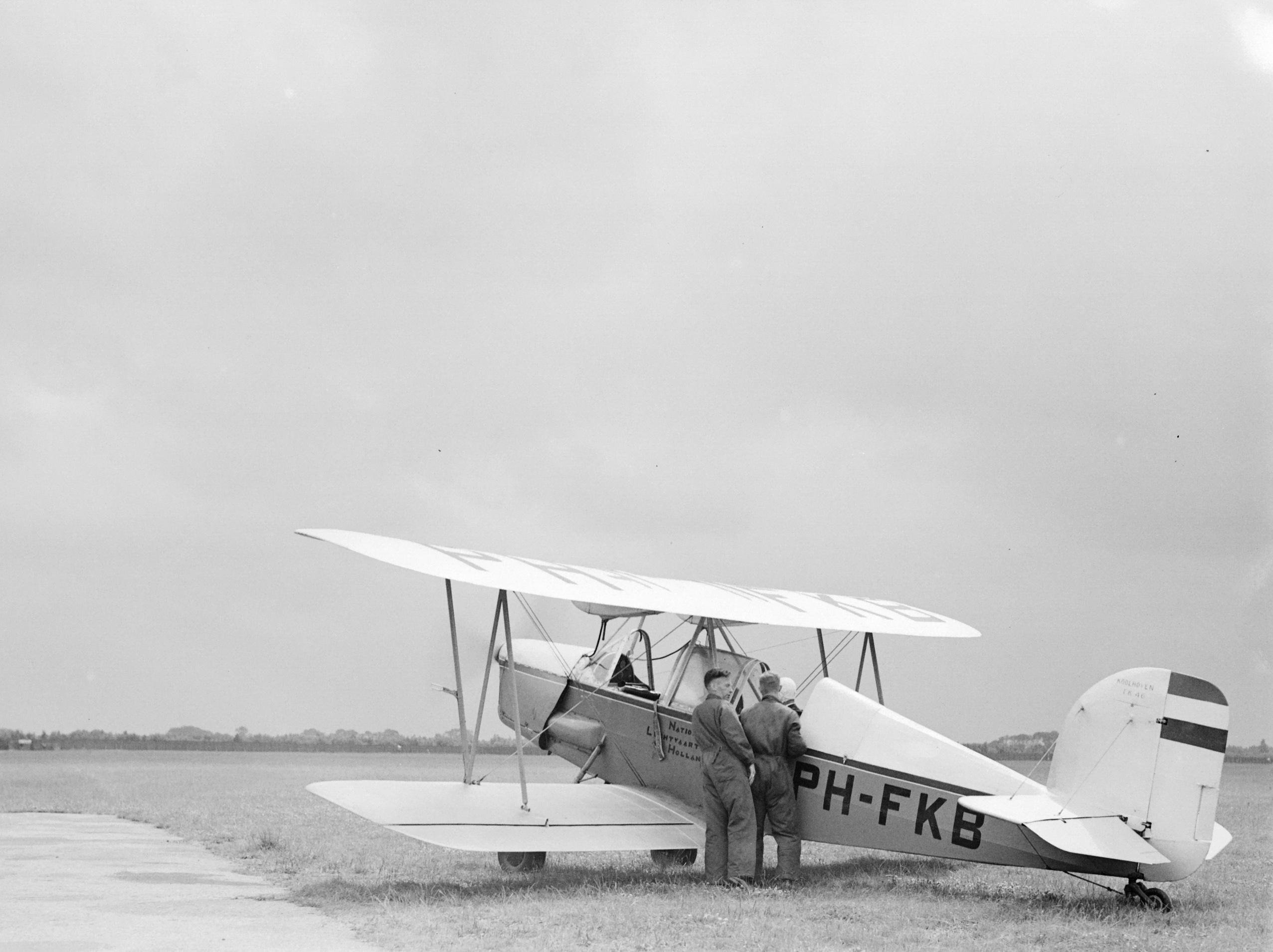 Collectie / Archief : Fotocollectie Van de Poll Reportage / Serie : Nationale Luchtvaartschool Holland Beschrijving : De Koolhoven FK-46 PH-FKB van de Nationale Luchtvaartschool klaar om van het Rotterdamse vliegveld Waalhaven te vertrekken. Twee mecaniciëns staan opzij van de adspirant-piloot Datum : 1935 Locatie : Rotterdam, Waalhaven Trefwoorden : piloten, vliegopleidingen, vliegtuigen Persoonsnaam : Koolhoven Frits Fotograaf : Poll, Willem van de Auteursrechthebbende : Nationaal Archief Materiaalsoort : Negatief (zwart/wit) Nummer archiefinventaris : bekijk toegang 2.24.14.02 Bestanddeelnummer : 255-8641